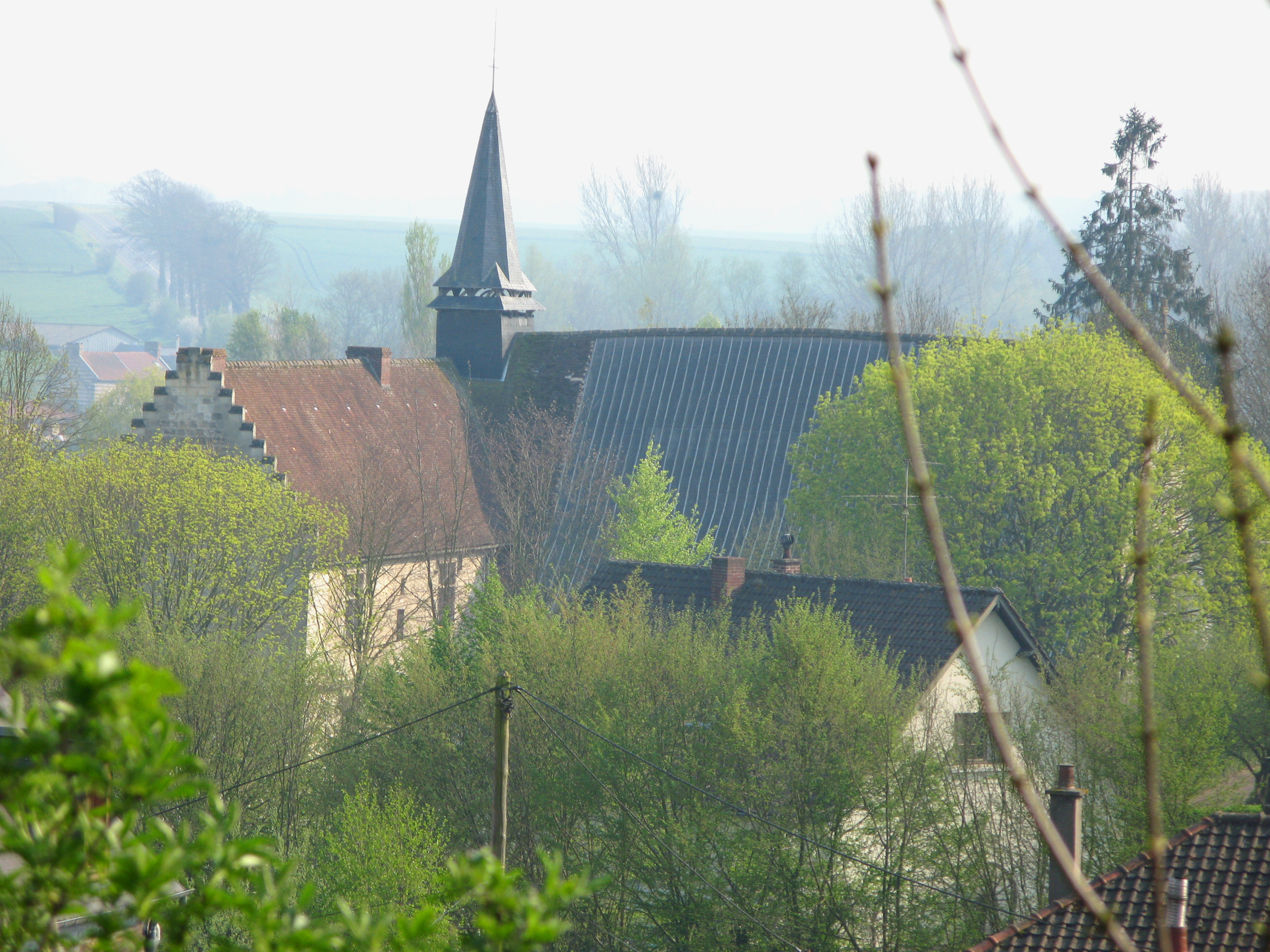 Airaines (Somme, France)